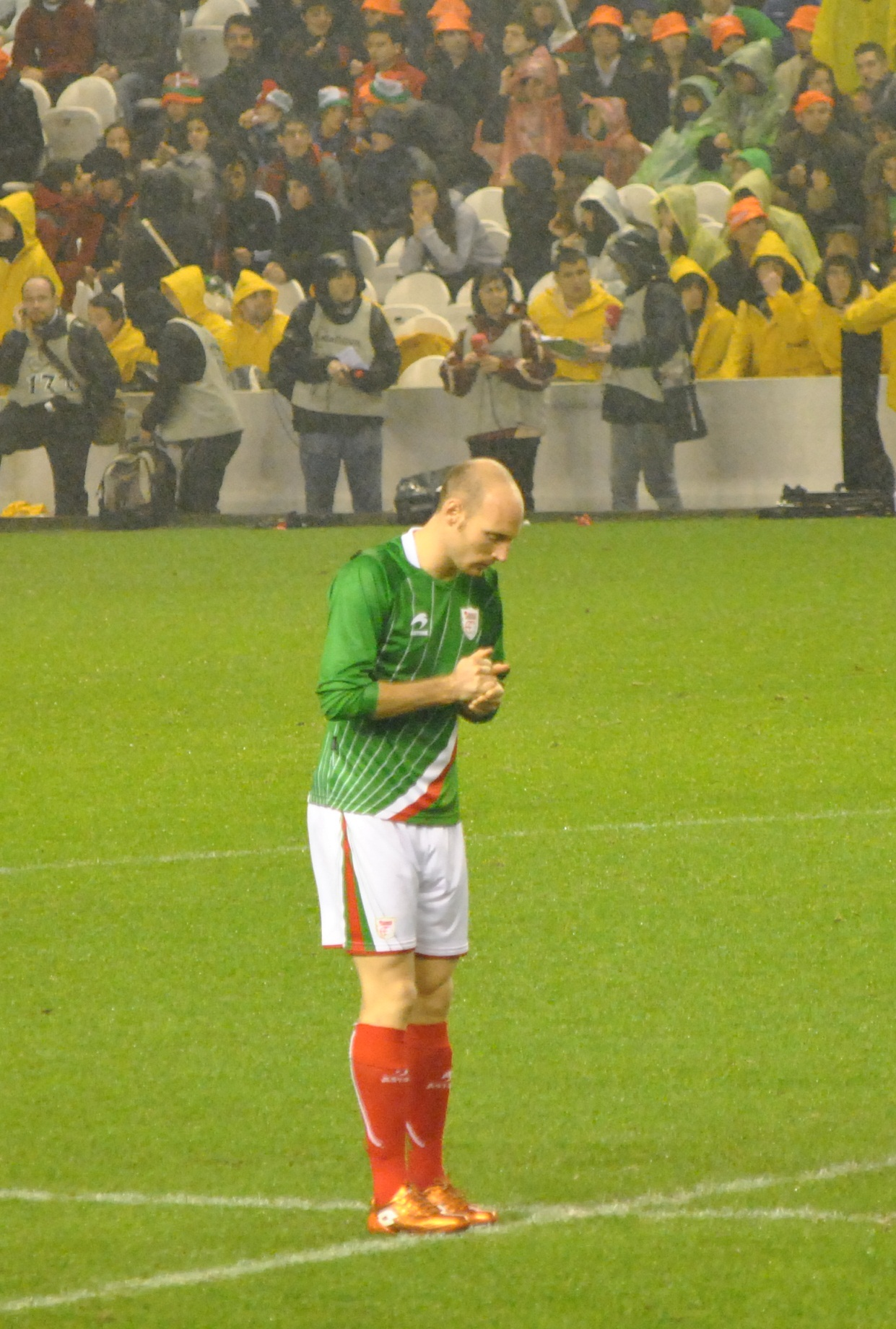 Gaizka Toquero.